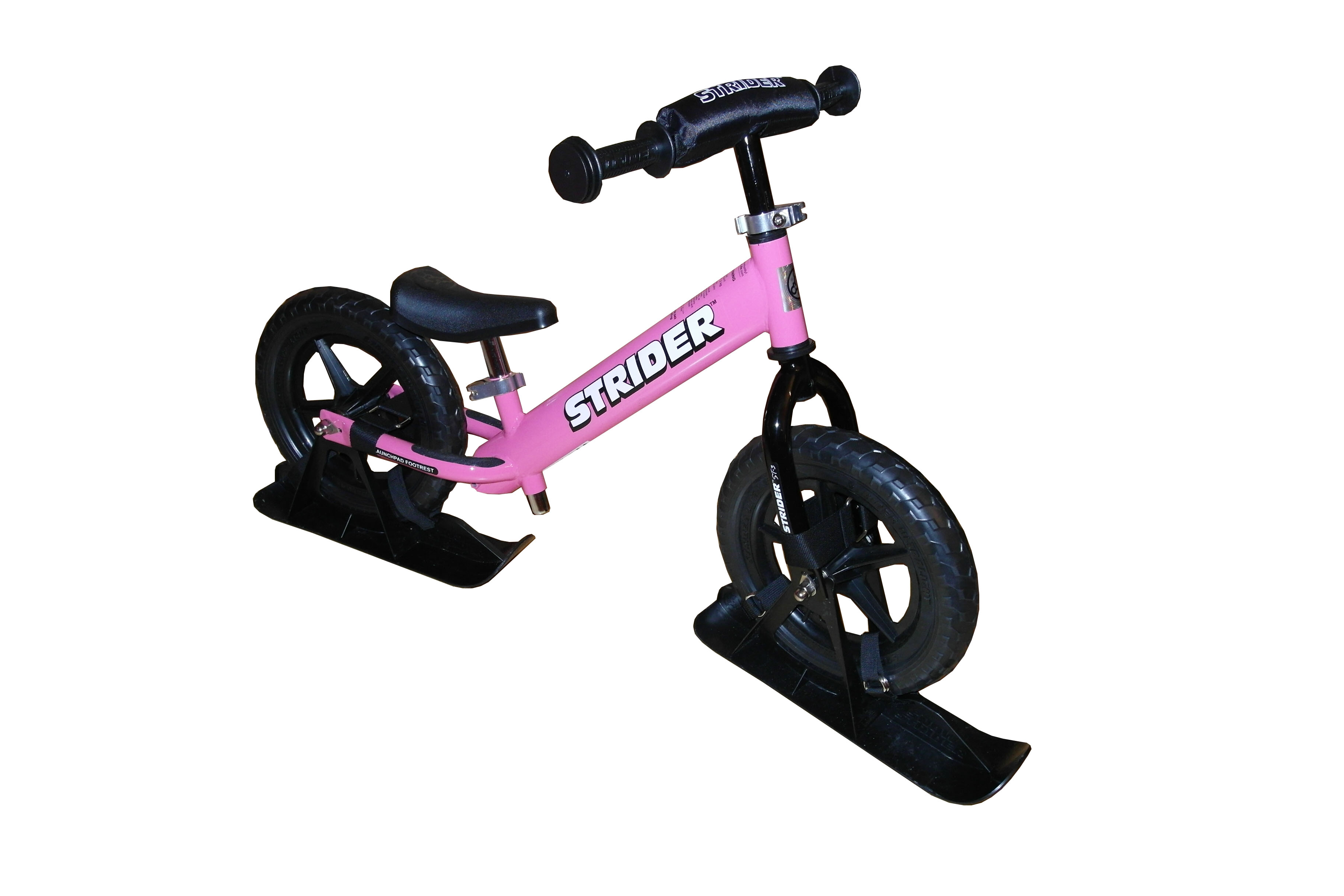 Strider pyörä ja sukset